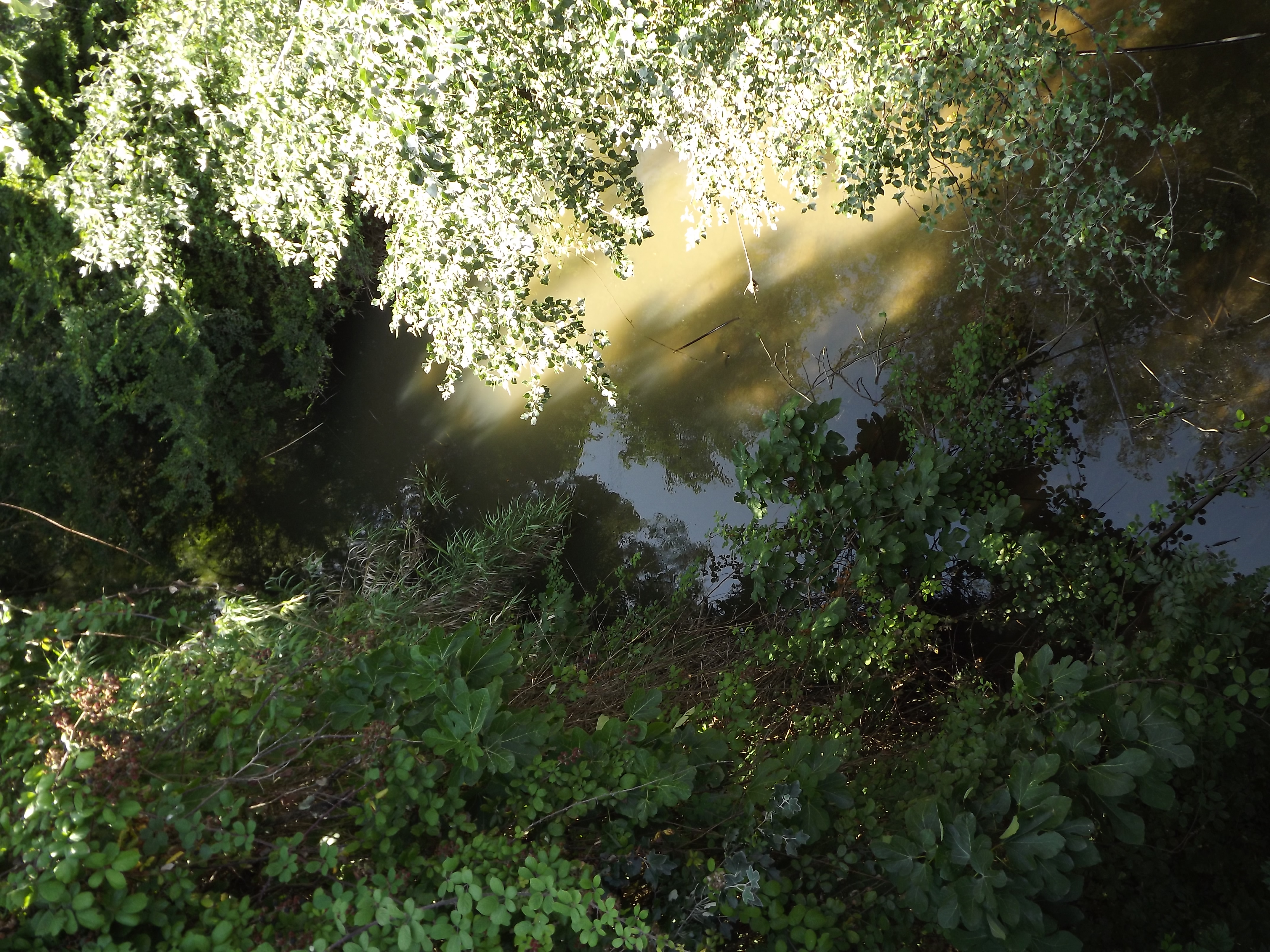 Ribeira da Ponte da Pedra. Foto tirada na ponte da N3 na fronteira entre a freguesia de São João Batista e o concelho de Vila Nova da Barquinha.